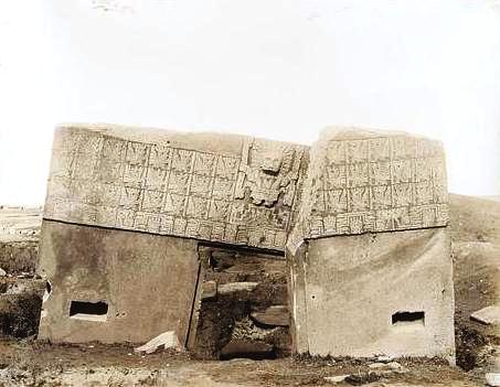 Puerta del Sol. Tihuanacu, primeras excavaciones